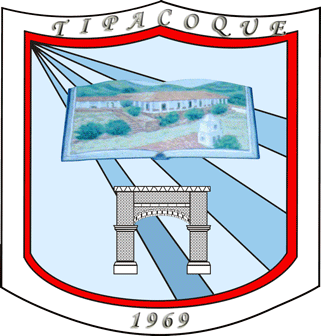 Escudo del Municipio de Tipacoque Boyacá